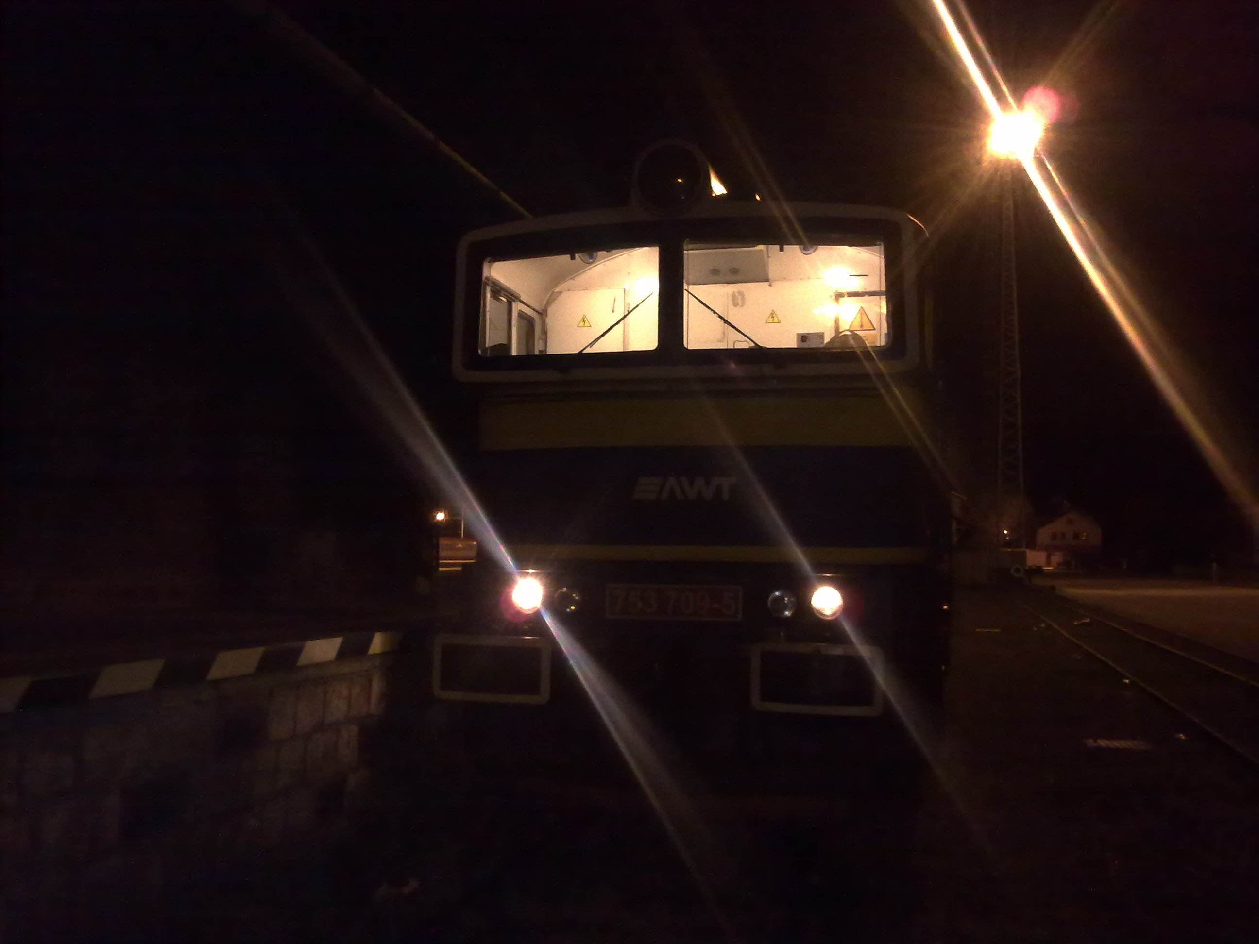 Lokomotiva 753 dopravce AWT